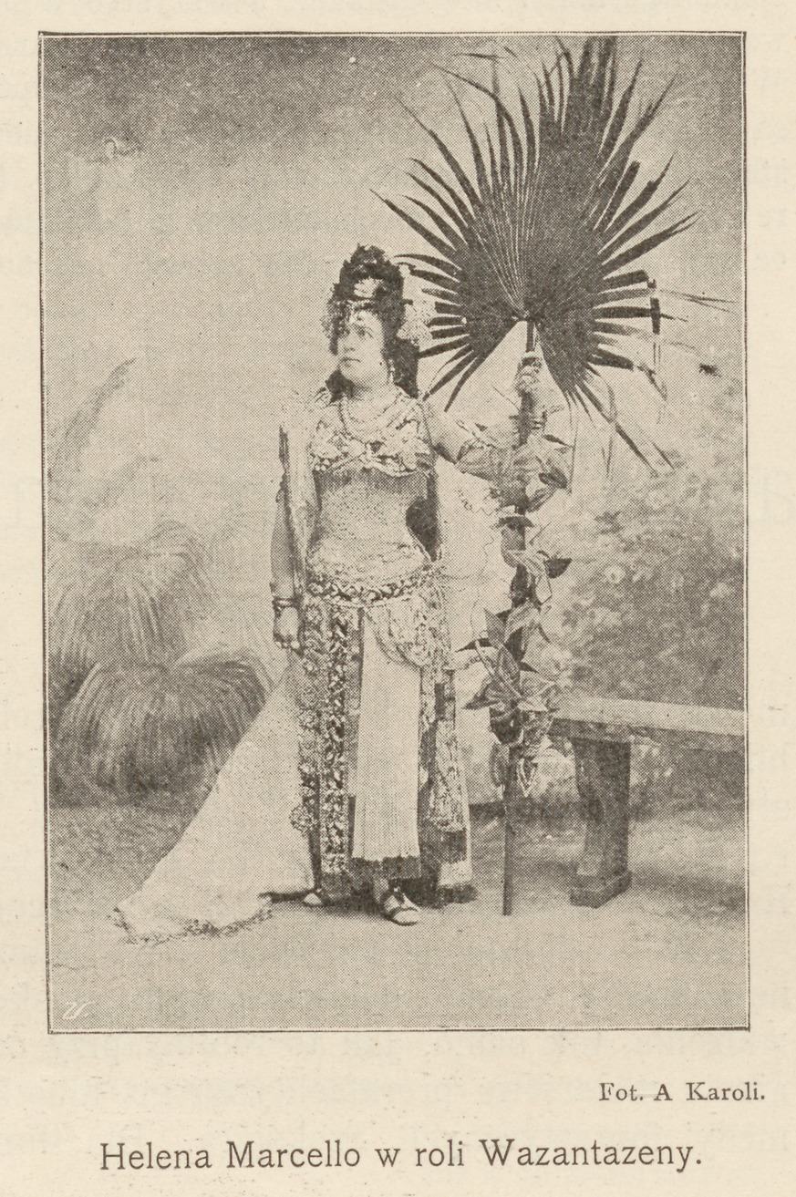 Helena Marcello w roli Wazantazeny : Fot. A. Karoli